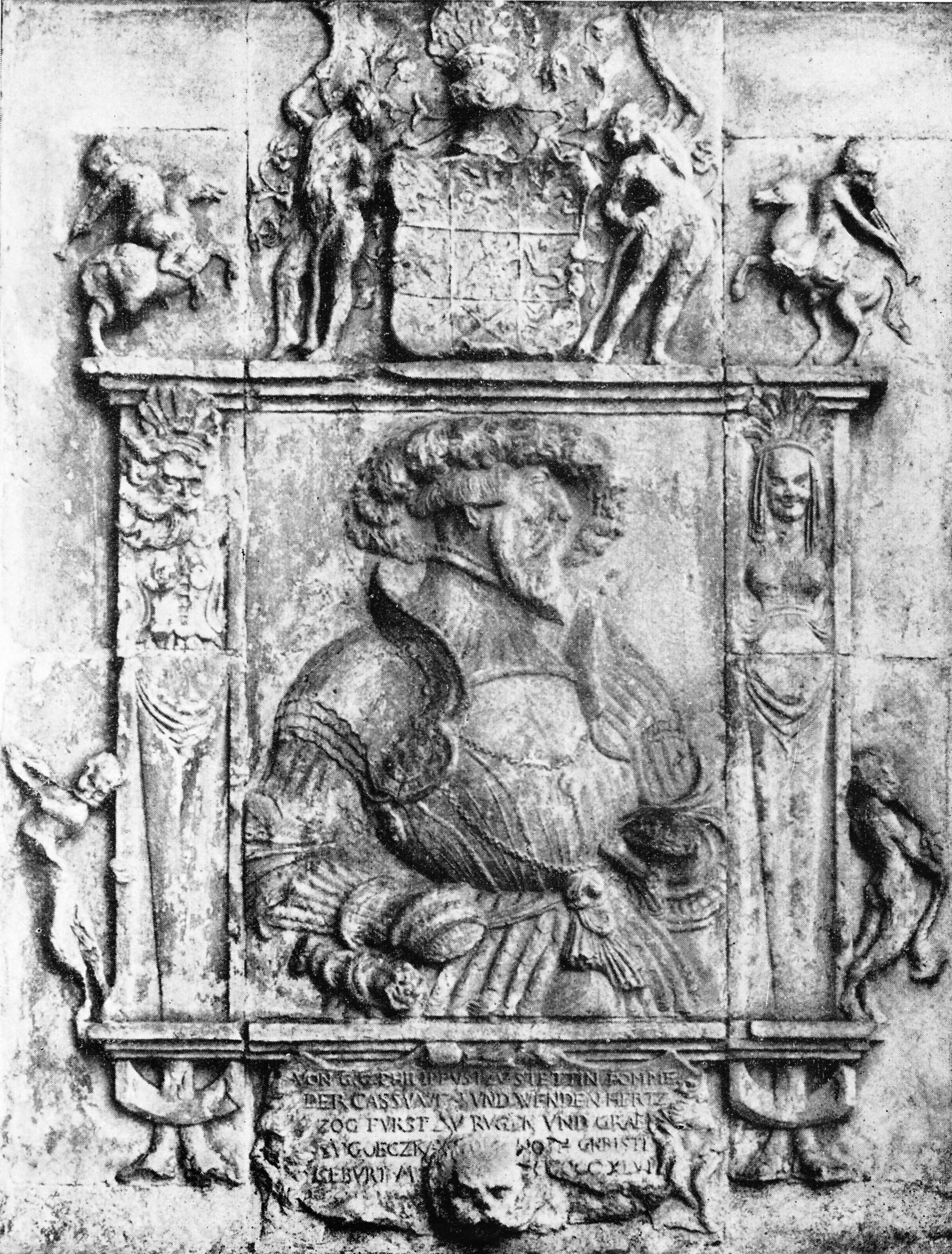 Sandsteinrelief von Herzog Philipp I. von Pommern-Wolgast aus dem Schloß Ückermünde